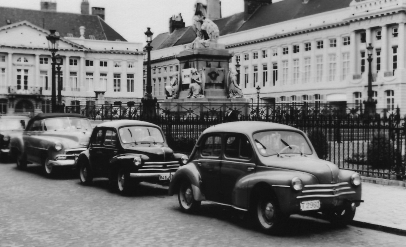 Fahrzeuge in Brüssel, vorne zwei Renault 4CV (Besuch zur Weltausstellung 1958)